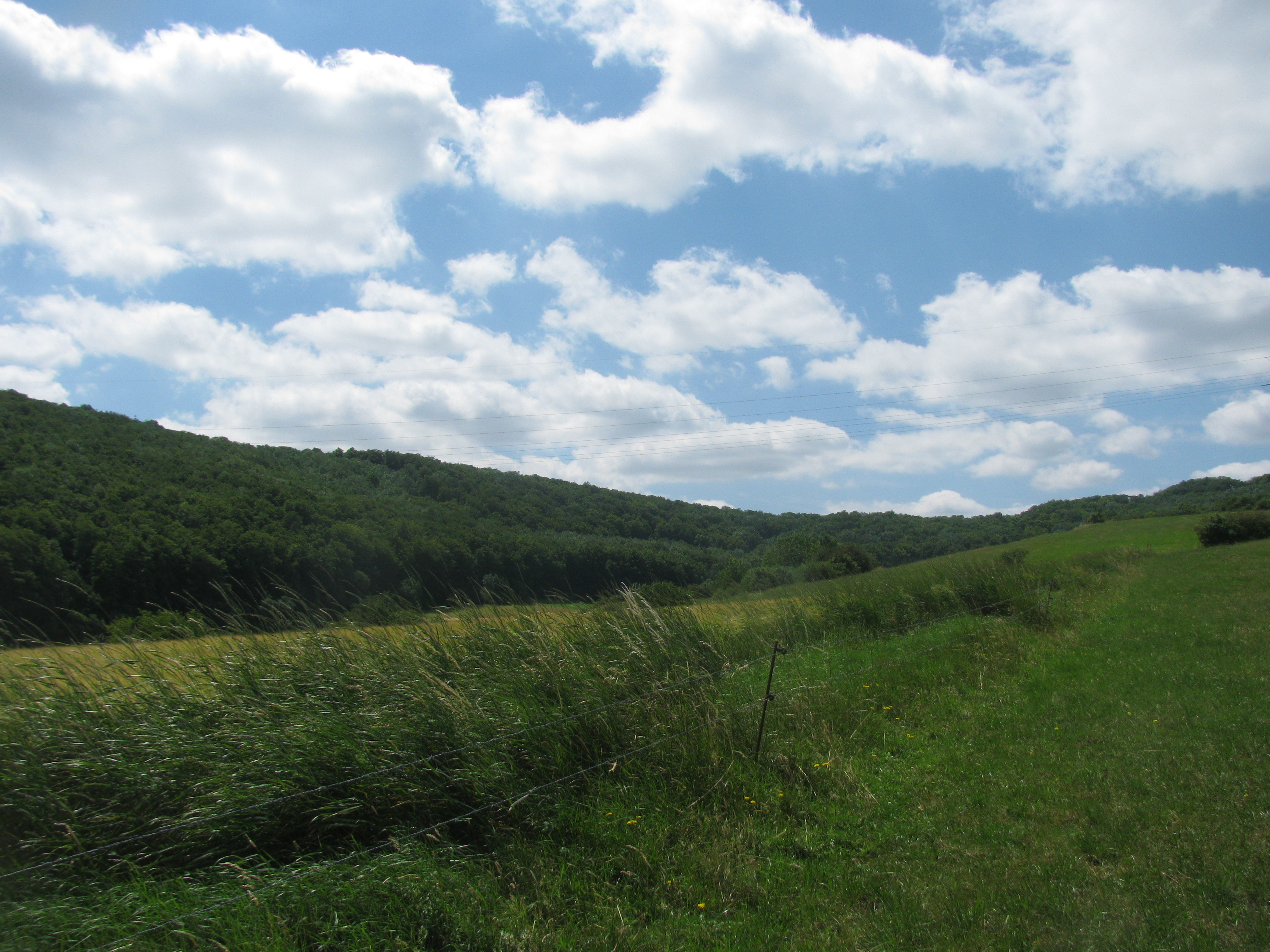 das Tal mit beiden Hängen gehört zu dem FFH-Gebiet Reichenbacher Kalkberge, FFH 4824-301